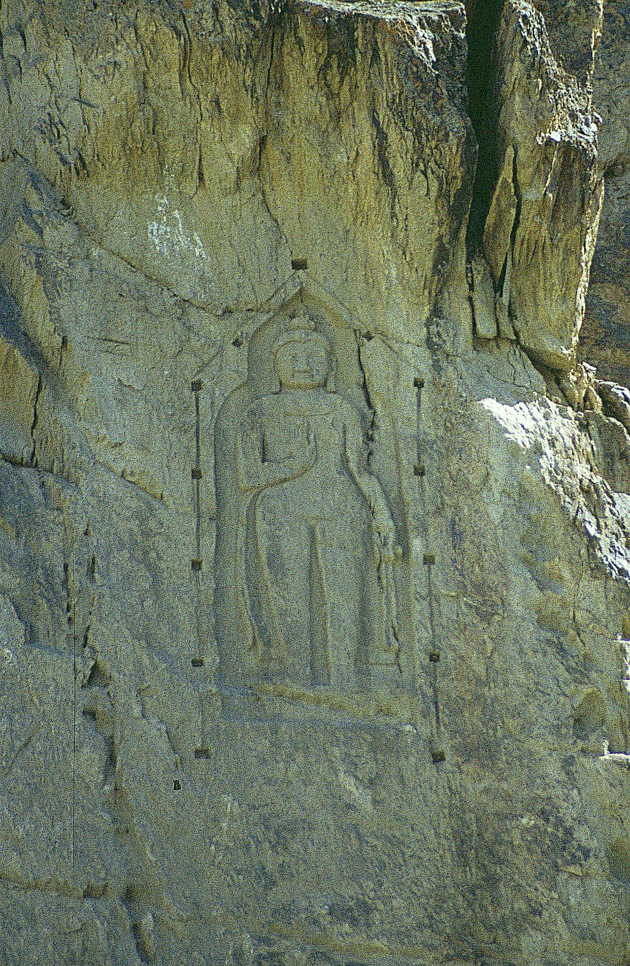 stehender Buddha (8. Jh.), Felsrelief am Karakorum Highway